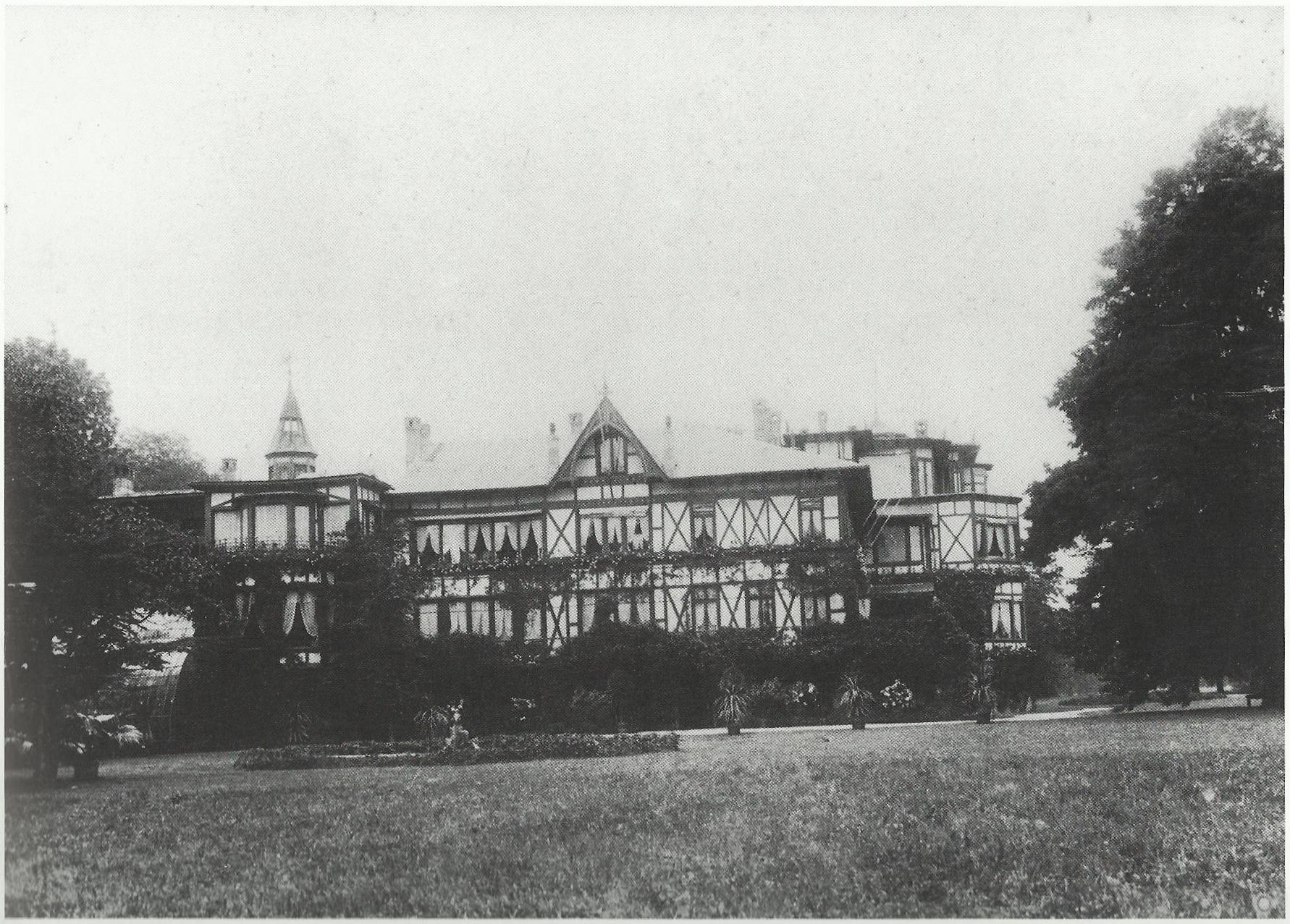 Villa Deichmann, Bad Godesberg: Ansicht von Südosten